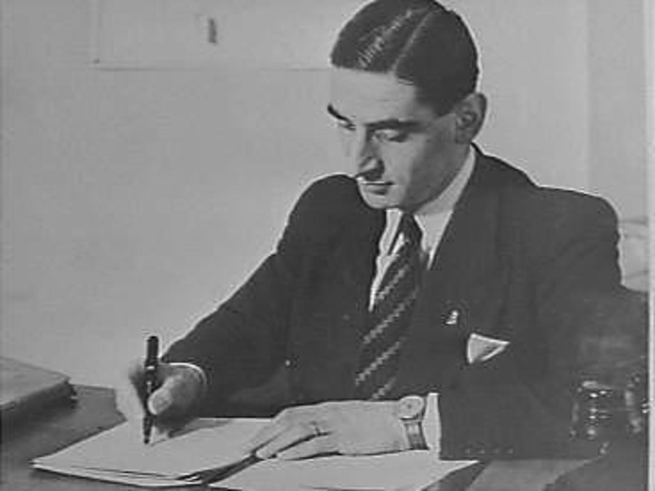 "Vrij Nederland" in Londen. A. Milhado jr., verkoopleider van de Netherland Publishing Company en verantwoordelijk voor de distributie van "Vrij Nederland" in Londen. 1944